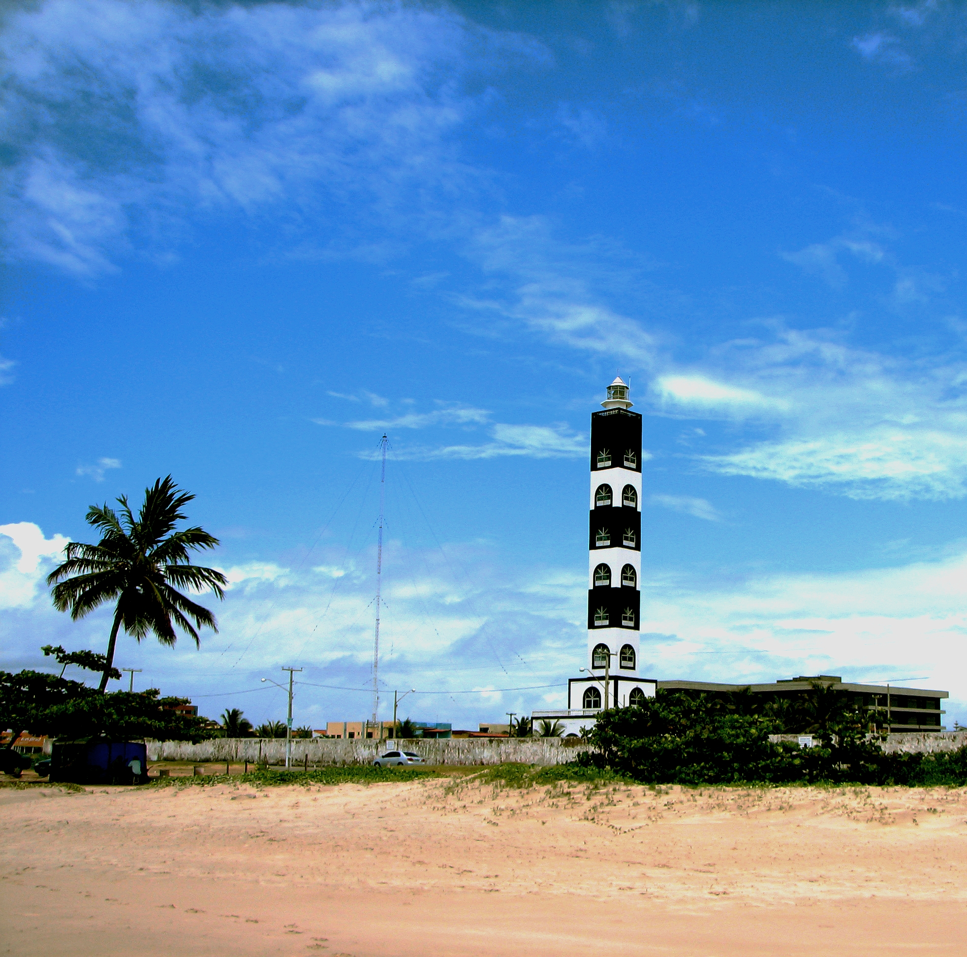 Aracaju/SE Interessante que eu vi em um folder do hotel o farol e como eu tinha como destino me virar andando pela cidade, sai andando alguns km para o sentido contrário, então quando me dei conta disso (graças a um jardineiro da orla) peguei um táxi e pedi para que me levasse até aí... Eu esperava que o farol tivesse algo por perto, mas nada... Ele fica em uma casa da marinha, a única coisa 'social' que parece ter por perto é uma casa de festas (formatura, 15 anos e tal) em frente a casa dele ... :P Desci do táxi, o cara foi embora aparentemente desconfiando se eu não estava perdido, falou que já tinha subido lá em cima e tal... Perguntei se era aberto para visitação já todo aliviado... Aí ele falou que conhecia um filho de um cara que era faroeiro... E foi embora dizendo que eu poderia falar ao interfone para ver se ia lá... Mas achei melhor não e fui para praia, tirei umas fotos assim e peguei outro táxi para o centro da cidade, mas aí deixa para depois que eu falo demais... :P